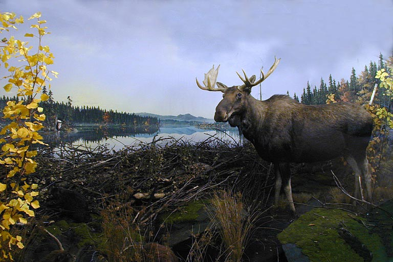 Diorama rappresentante un alce americano nella foresta boreale, conservato al Museo di storia naturale di Milano